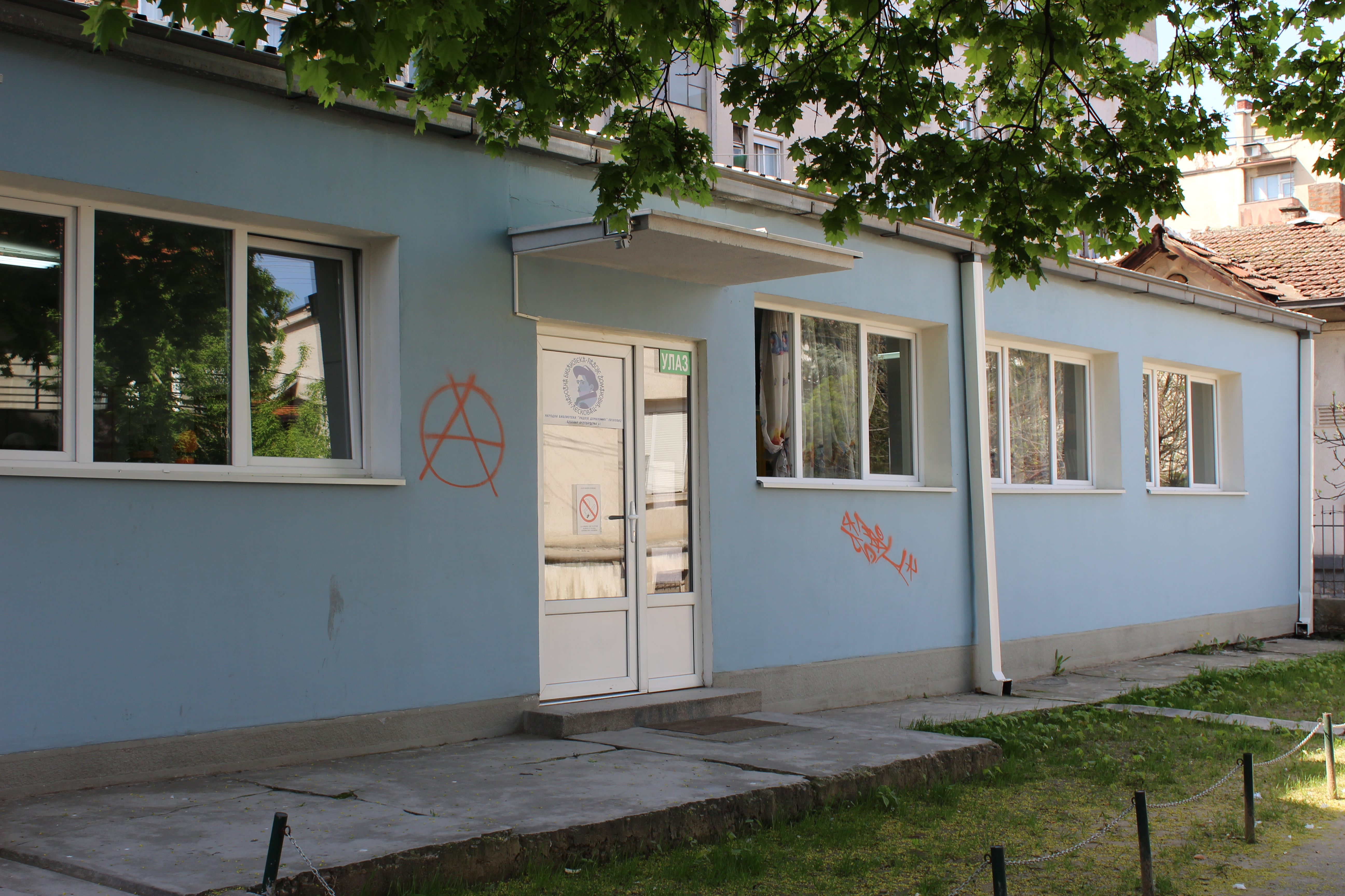 Narodna biblioteka "Radoje Domanović" u Leskovcu